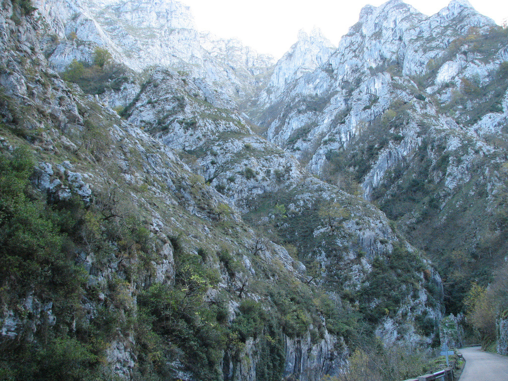 Desfialdero de los Beyos